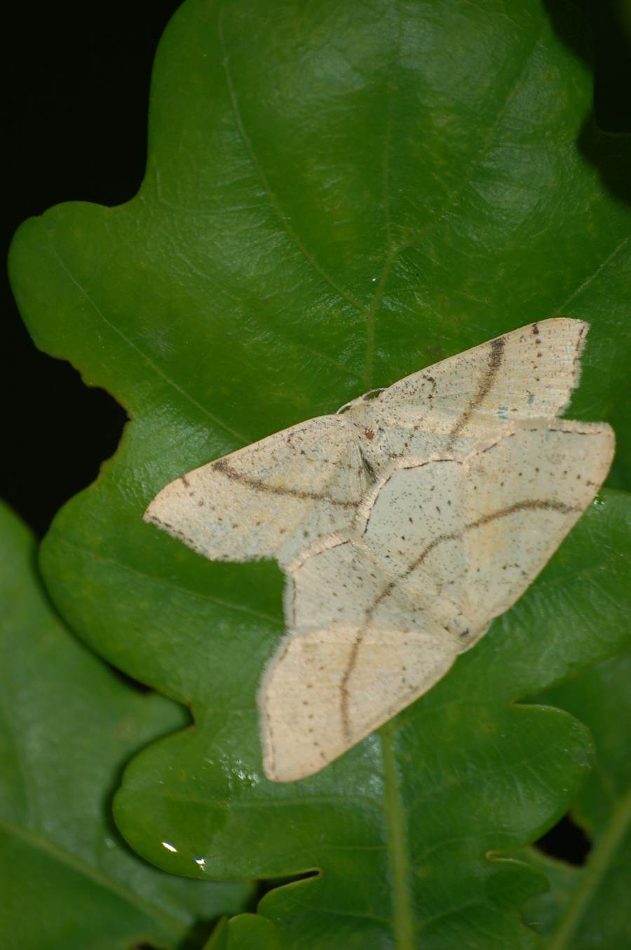 Cyclophora punctaria (Świerzbik nakropek)